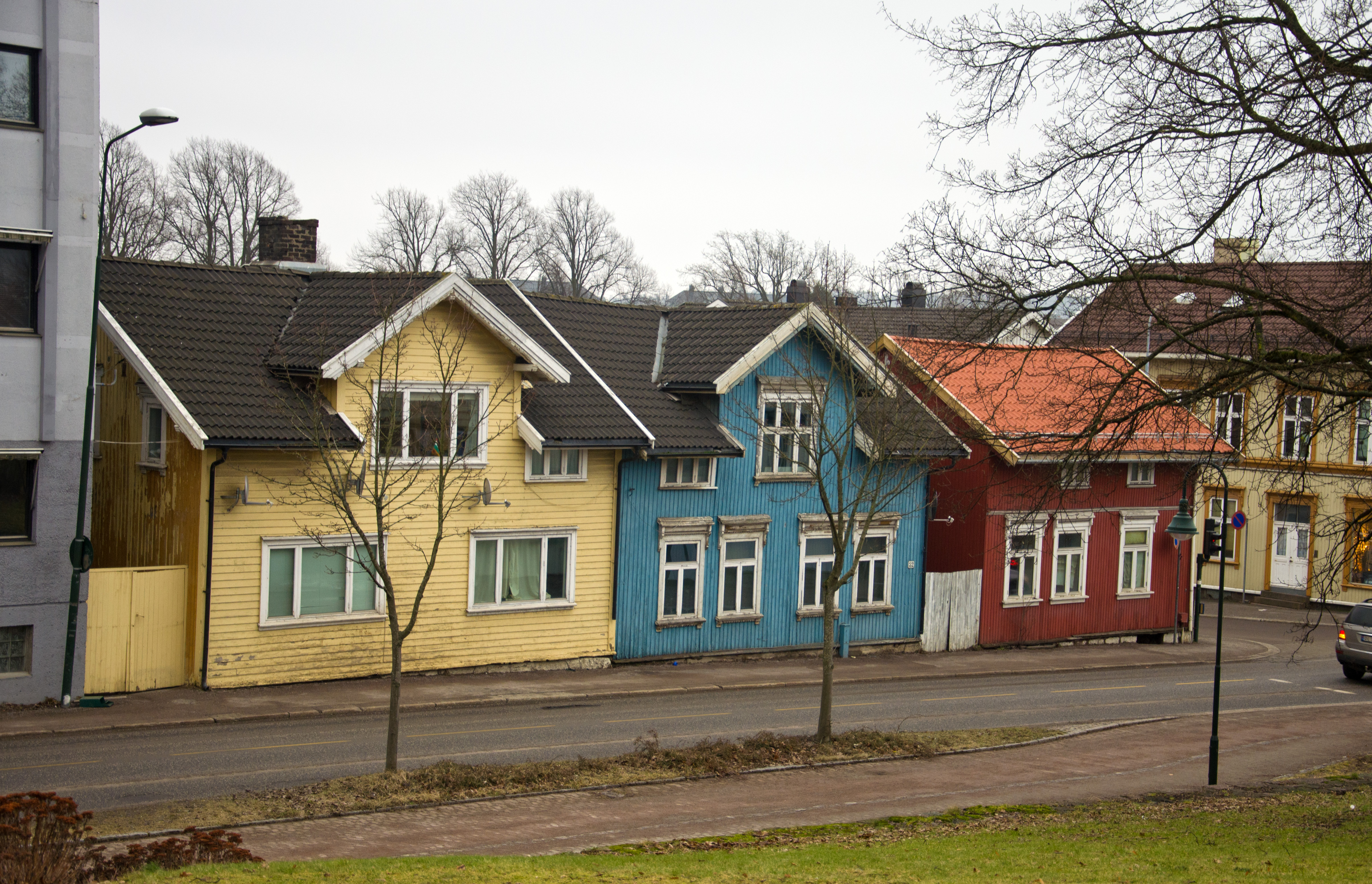 Stoltenbergs gate 30-32, St. Olavs gate 10, Tønsberg